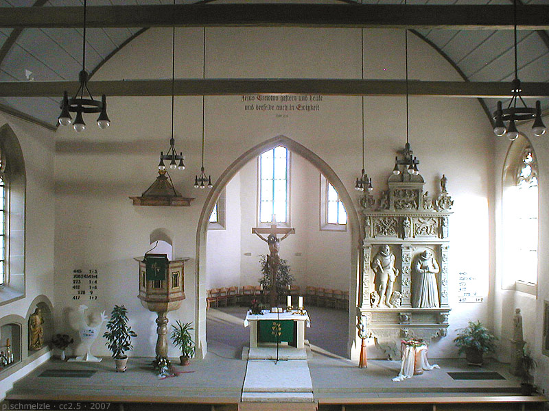 Blick zum Chor der Evang. Michaelskirche in Kürnbach, Baden-Württemberg, Deutschland